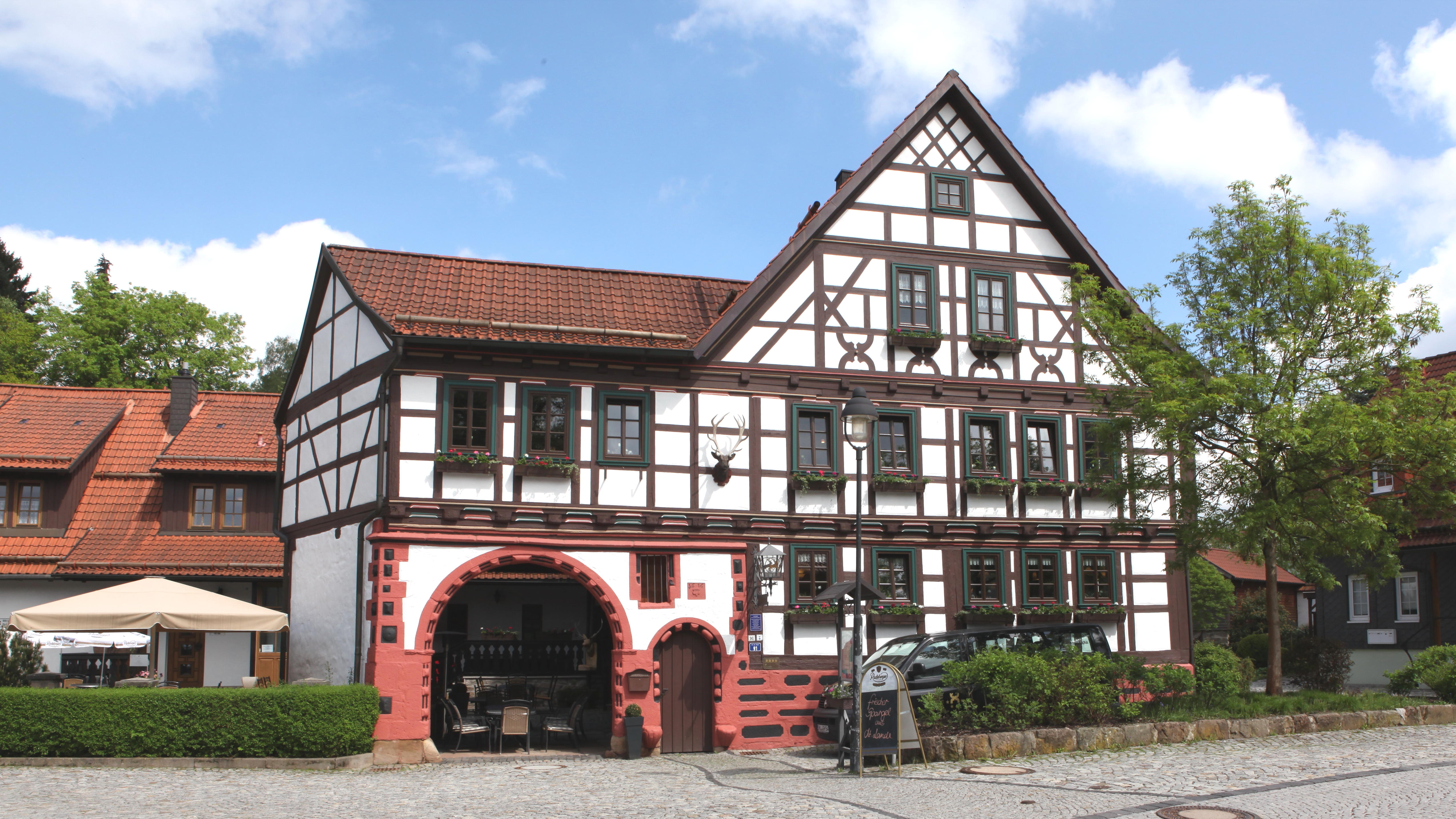 Gasthof Zum Goldenen Hirsch, 1616 errichtet, in Neundorf-Suhl